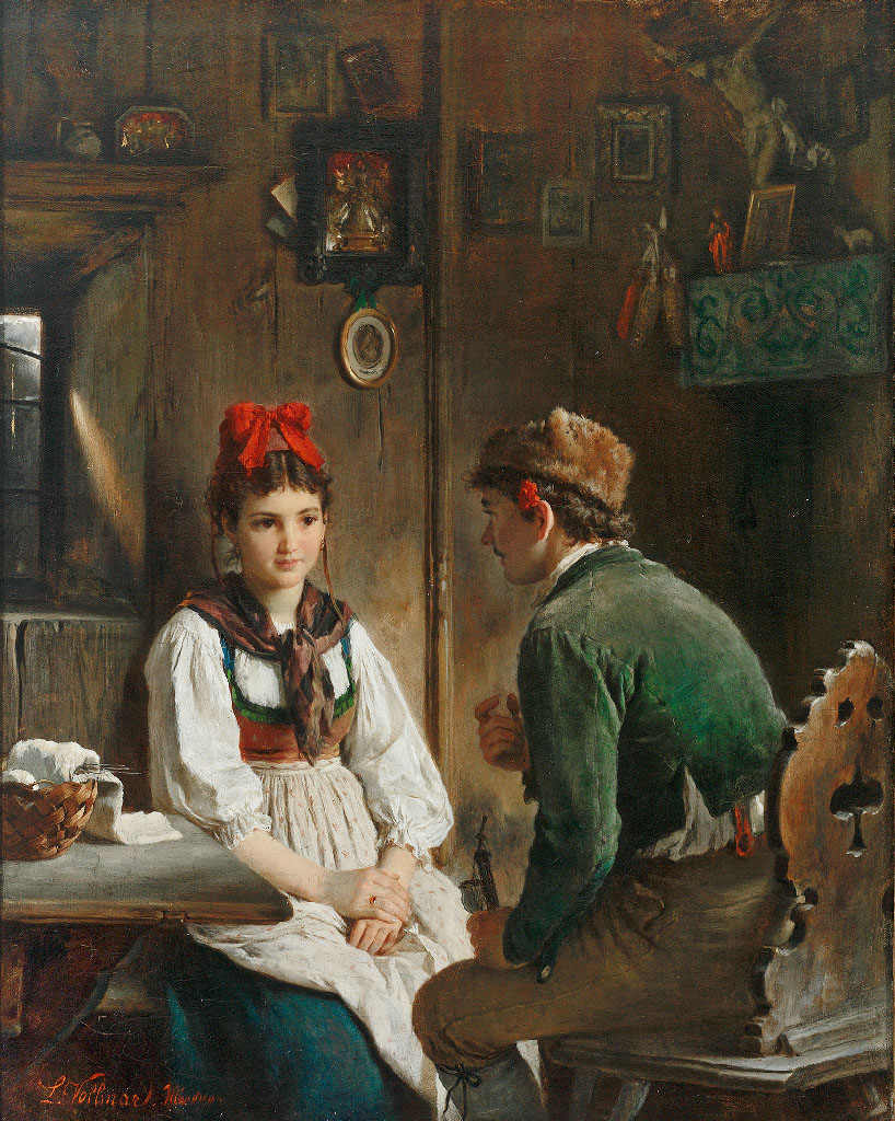 Ludwig Vollmar (1842–1884): Paar in Schwarzwälder Bauernstube, (eventuell das in der Literatur genannte Werk "Der verschmähte Freier" ?). Öl/Lwd. 70 x 55 cm Ludwig Vollmar (1842–1884) Description German painter Date of birth/death18421884Location of birth/deathBad SäckingenMunichWork locationMünchenAuthority control VIAF: 95674423 GND: 13908410X ULAN: 500026124